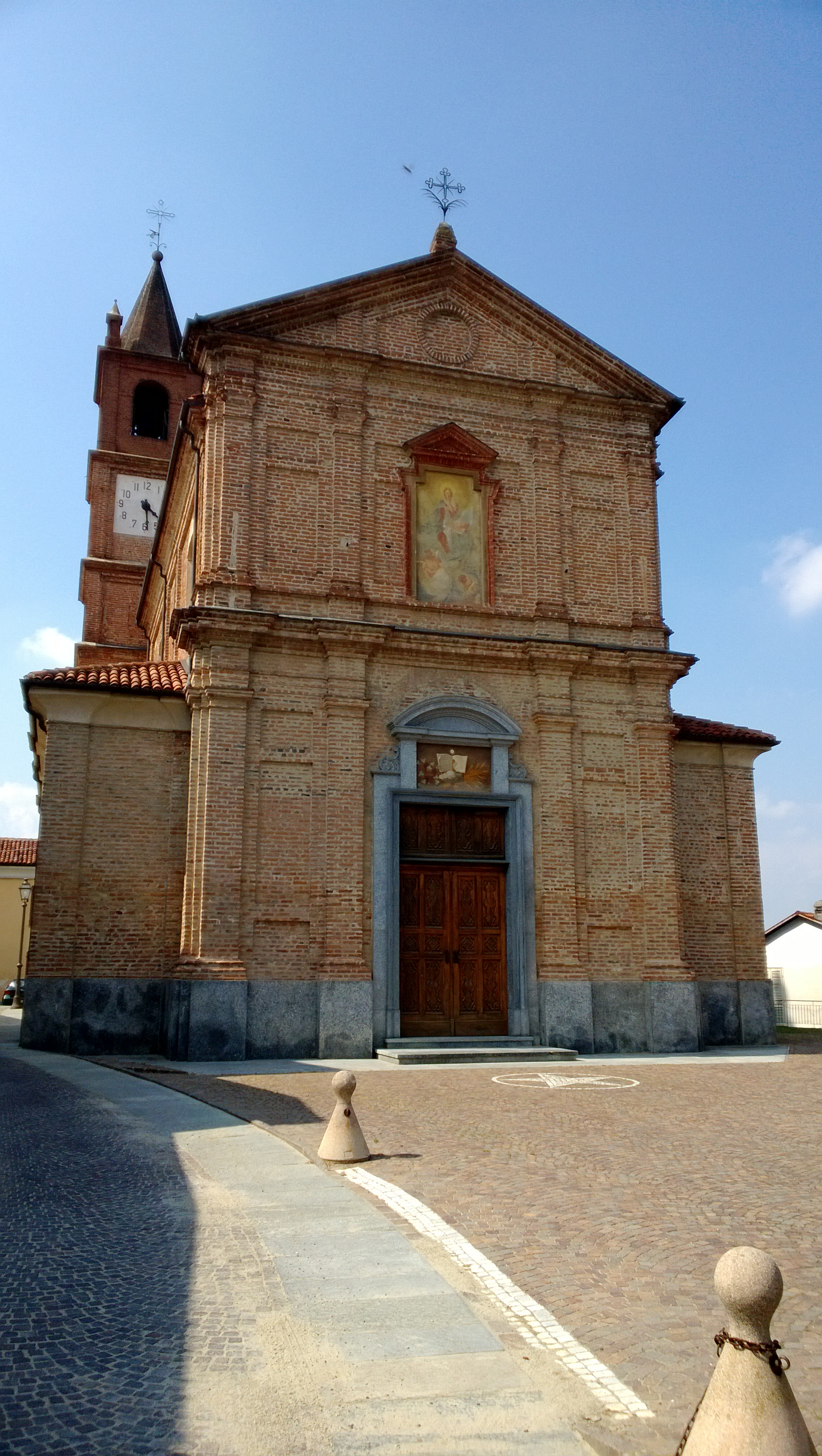 Chiesa parrocchiale di Maretto (AT), Italia.